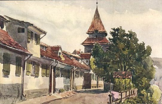 Ulm. Zundeltortürmchen und Seelengraben. (Ansichtskarte)